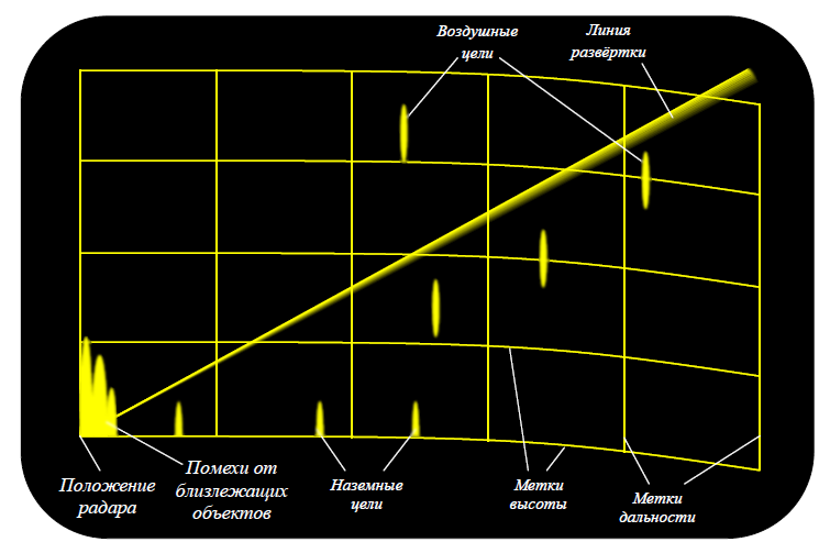 Экран архаичного индикатора дальность-высота (так он выглядел в 1950-х—1970-х годах)